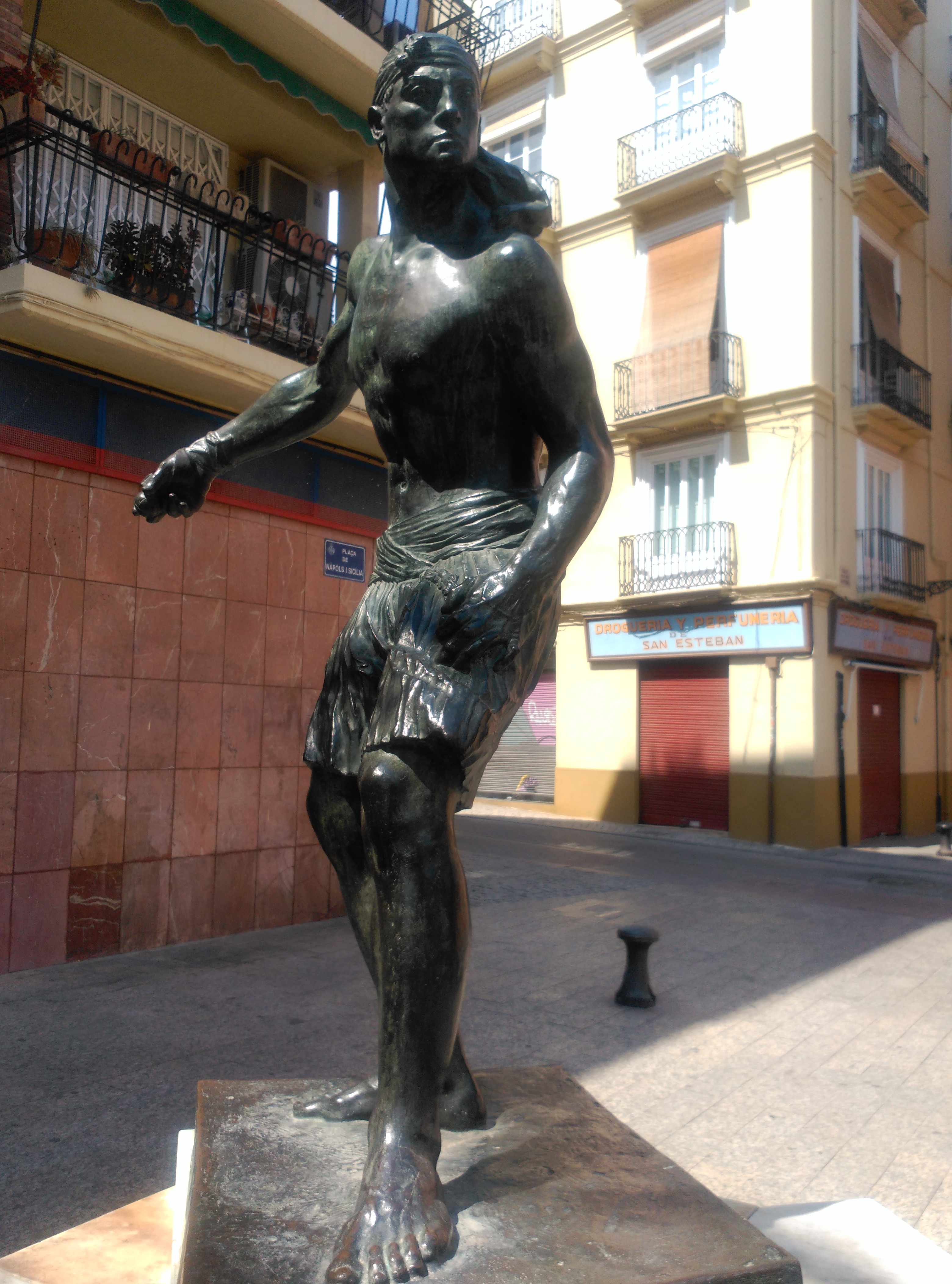 Fotografia de l'escultura El traure d'Ignasi Pinazo, un homenatge a l'esport de la pilota valenciana.